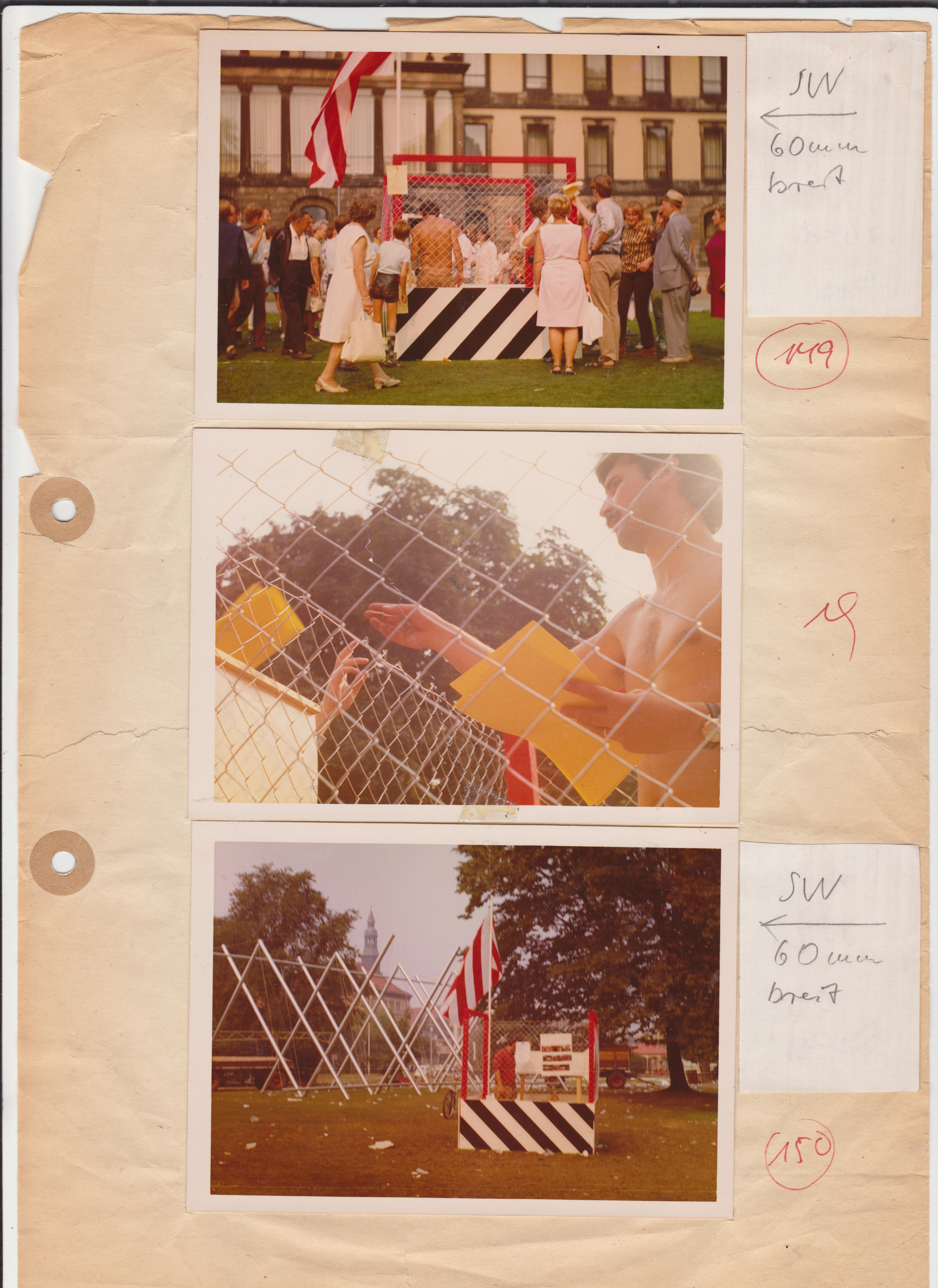 Der Künstler János Nádasdy 1970 in seiner Straßenkunstaktion "Wohnsperre" auf dem ersten "Straßenkunstprogram" mit Altstadtfest in Hannover; hier zu sehen vor dem Leineschloss / Niedersächsischer Landtag ...